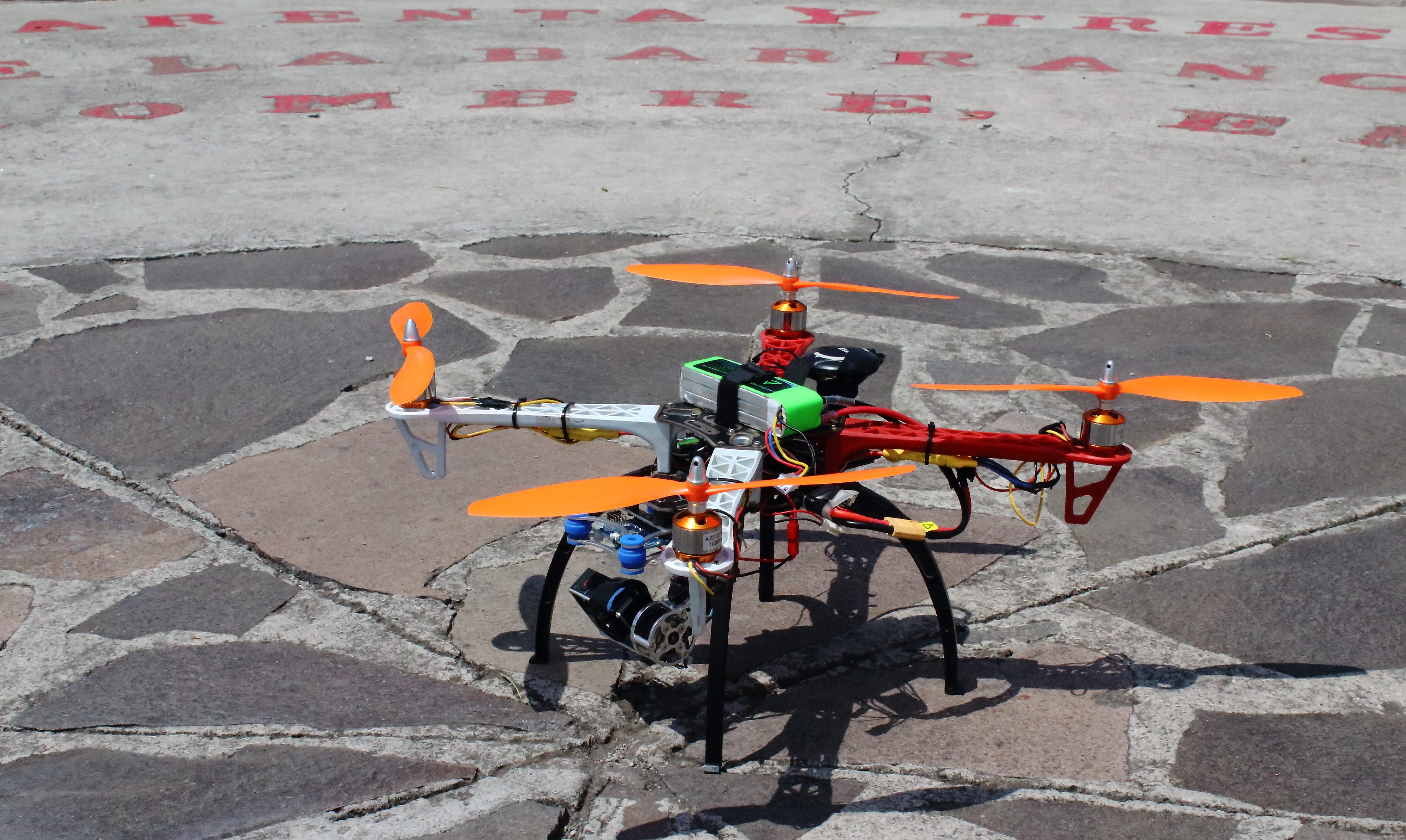 Fotografía de un drone en los Arcos del Sitio, Estado de México.